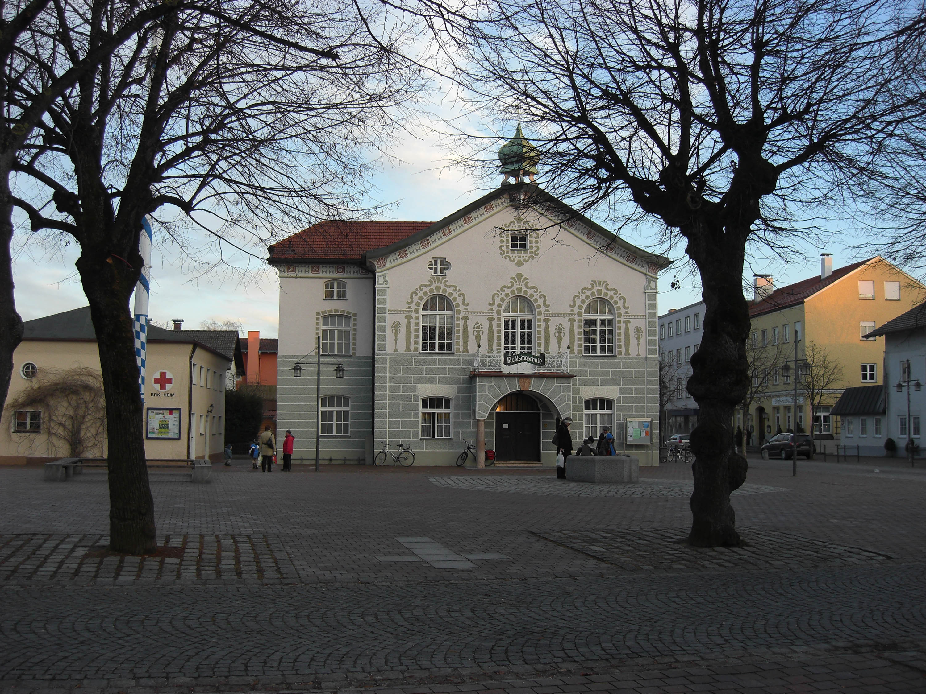 Altes Rathaus Kolbermoor am "Alten Rathausplatz Kolbermoor / Markplatz"